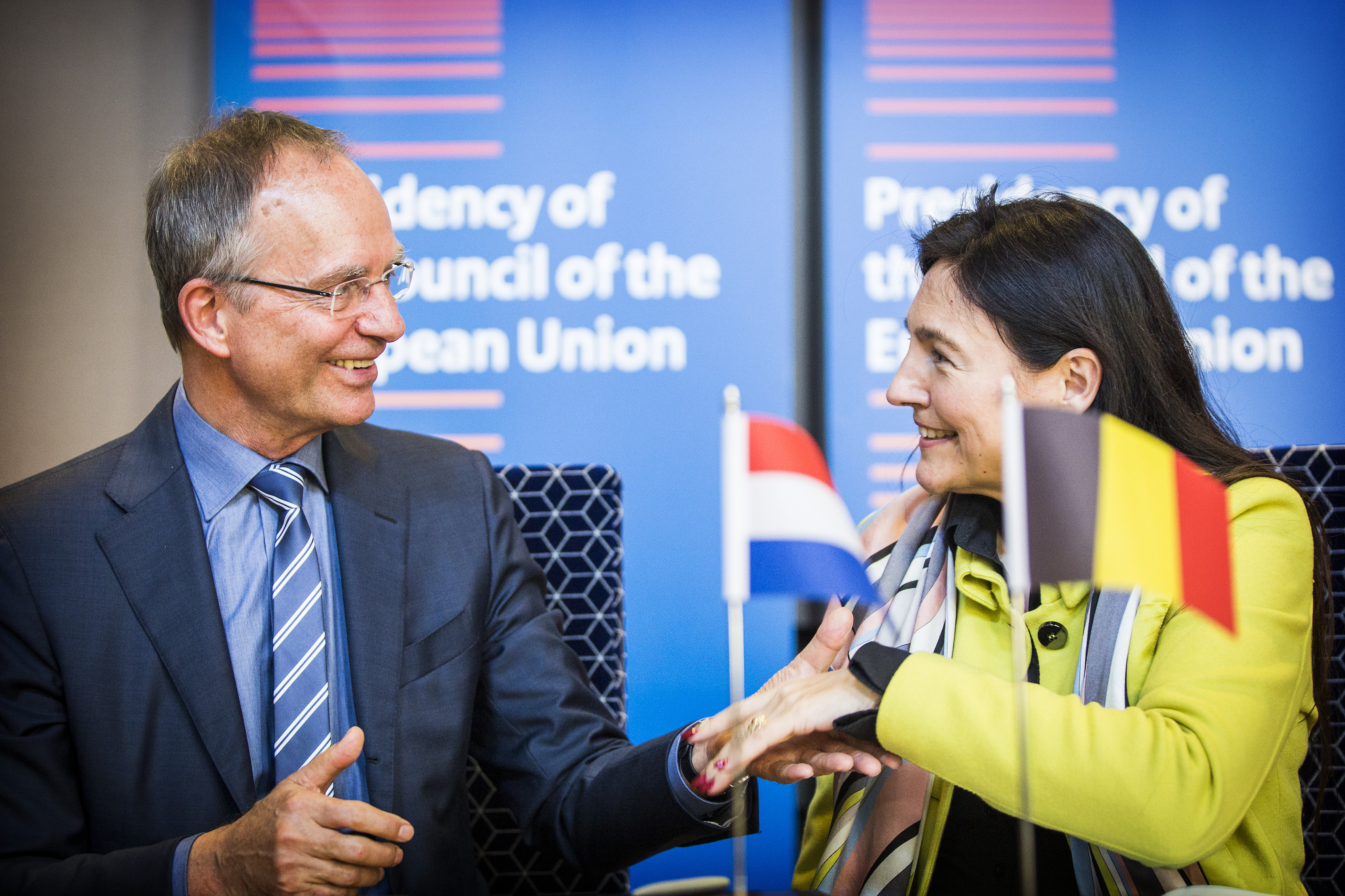 Amsterdam, April 11th 2016 / Amsterdam 11april 2016. Minister of Economic Affairs Henk Kamp and minister of Energy Marie-Christine Marghem sign an agreement on energy cooperation in the Scheepvaartmuseum in Amsterdam. Minister van Economische Zaken Henk Kamp en de Belgische minister van Energie Marie-Christine Marghem ondertekenen een samenwerkingsovereenkomst energie in het Scheepvaartmuseum in Amsterdam. Foto: Rijksoverheid/Valerie Kuypers – Photograph: Dutch Government/Valerie Kuypers